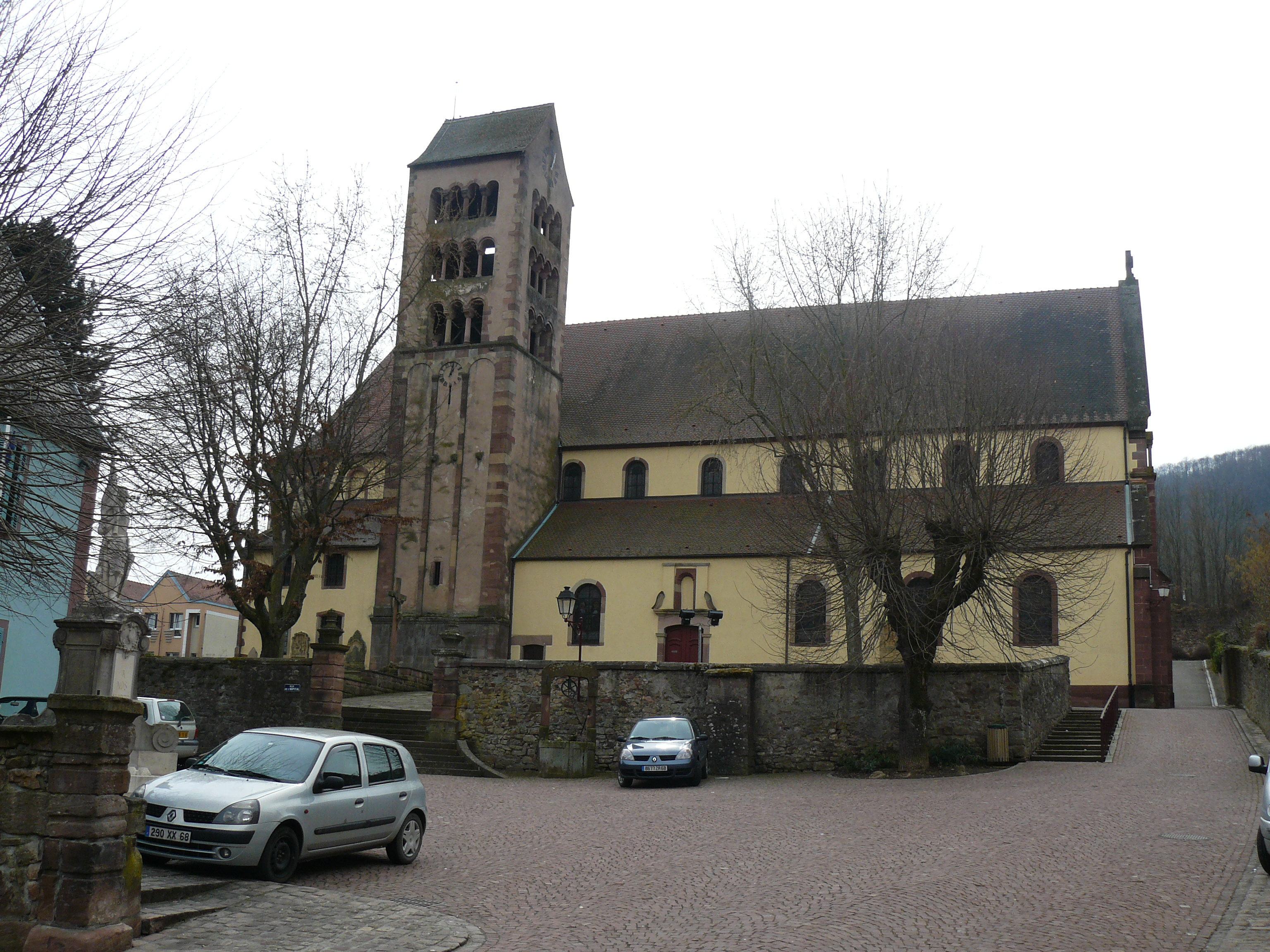 Église Saint Sébastien de Soultzmatt